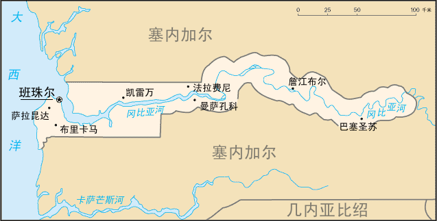 冈比亚共和国地图。